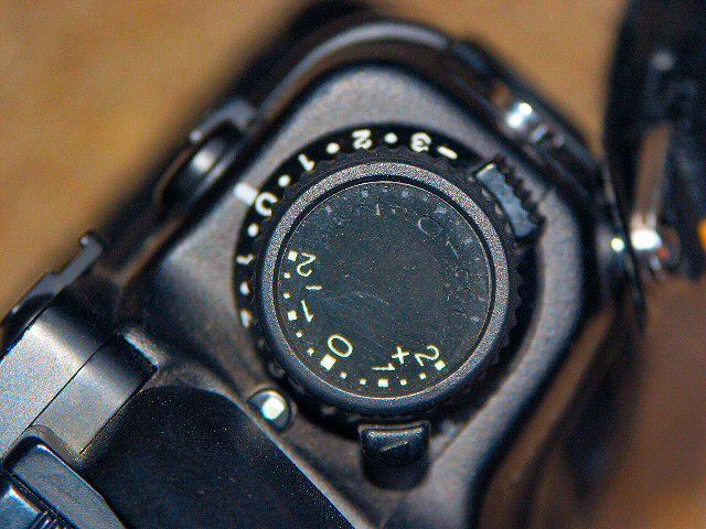 Motiv: Minolta Dynax 9 - Einstellrad für Belichtungskorrektur und Blitzbelichtungskorrektur (rechte Gehäuseseite) Aufnahmedatum: 23-Aug-2004 Fotografiert mit: Minolta Dimage 7 Hi